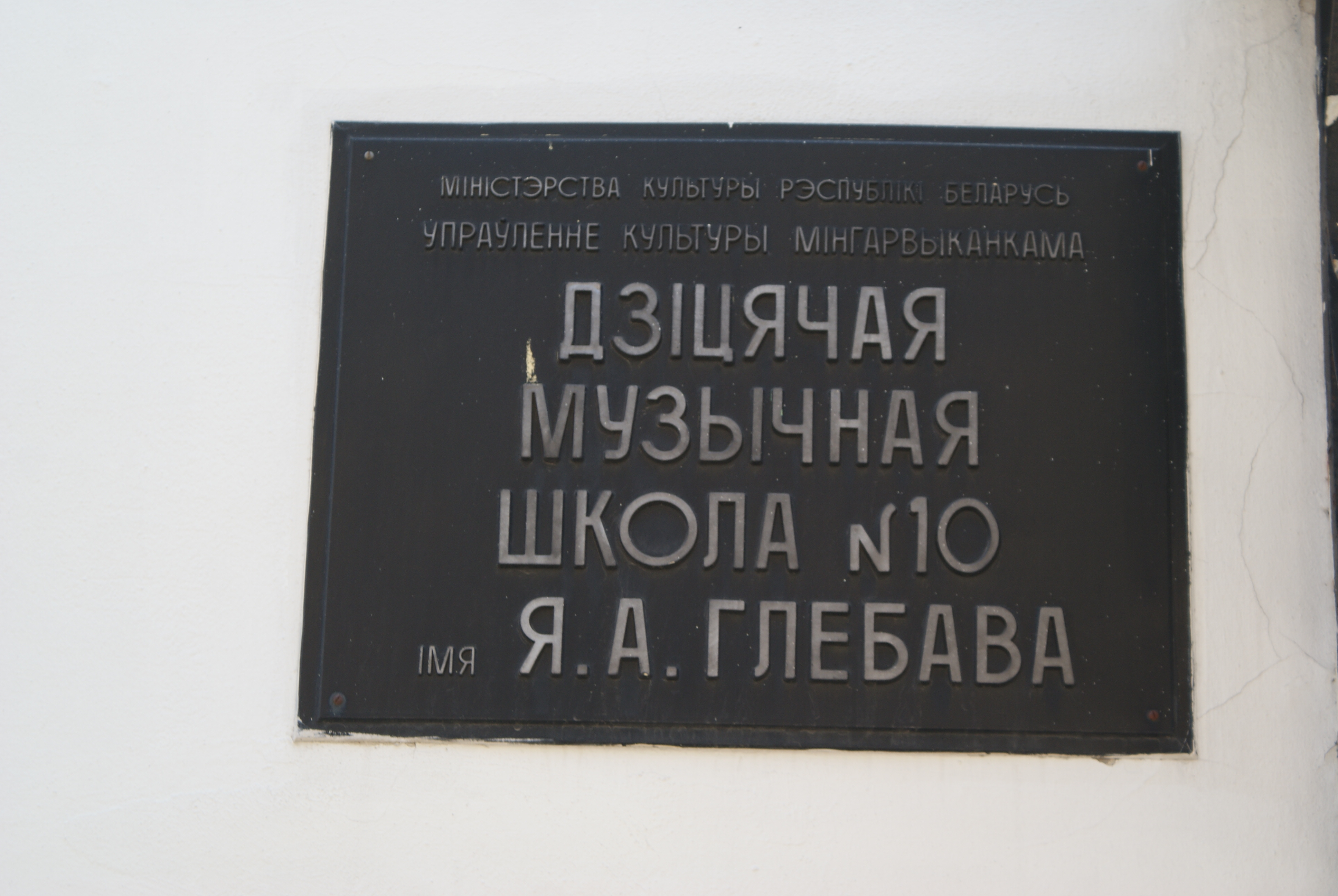 Верхні горад у Мінску